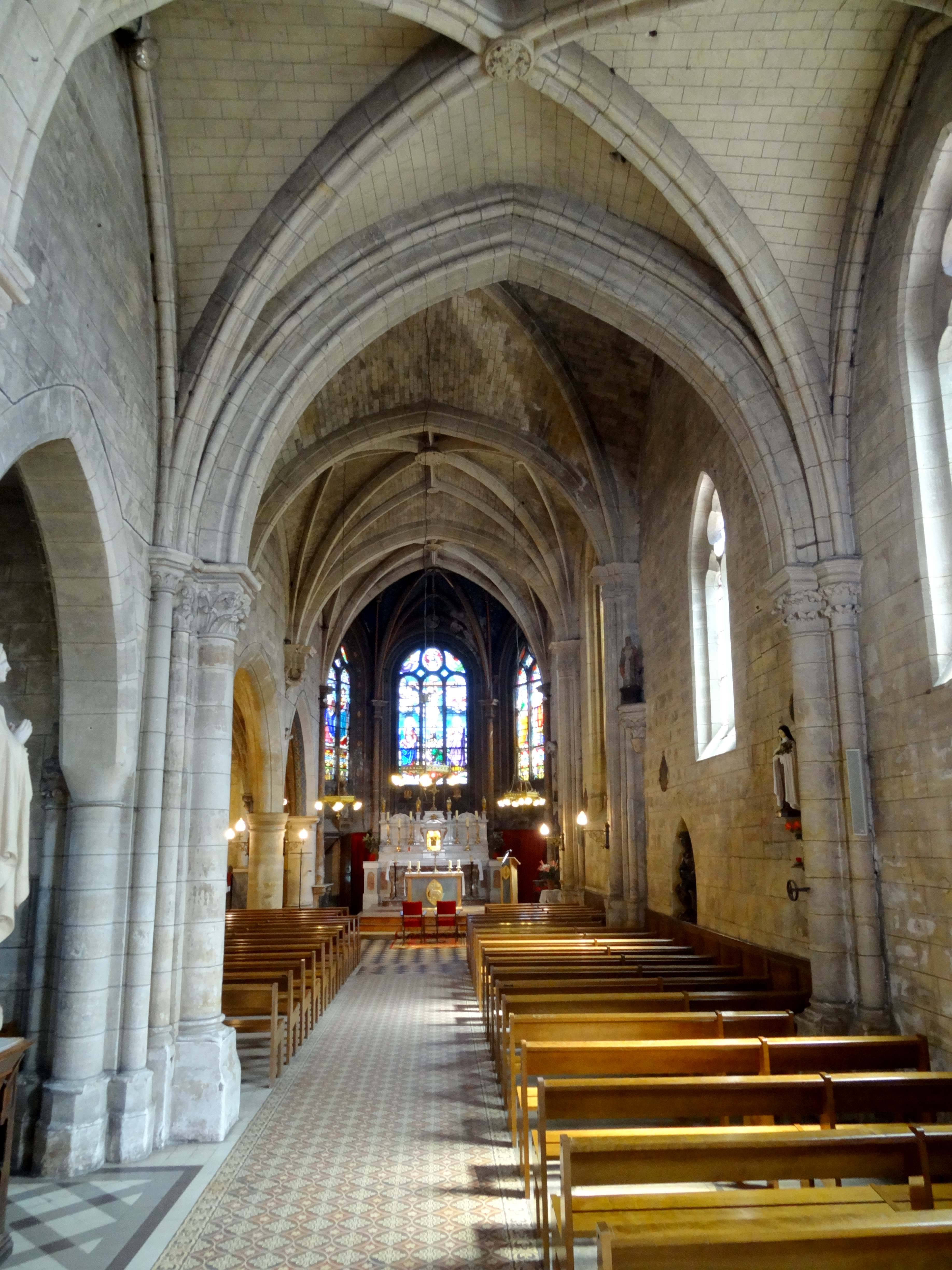 Intérieur de l'église - voir titre.